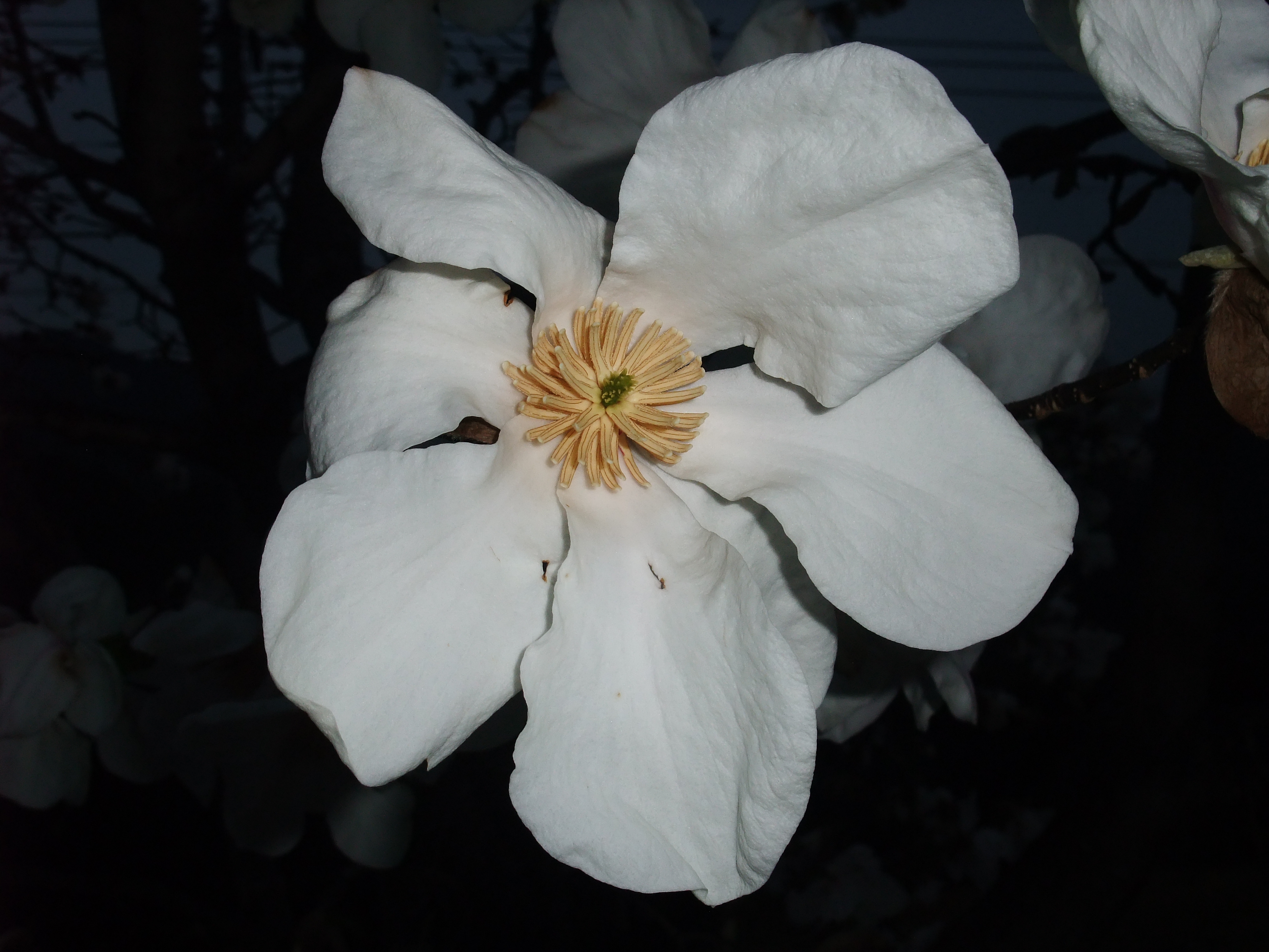 コブシモドキの花